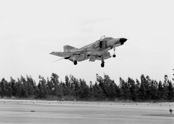 פאנטום קורנס 1981